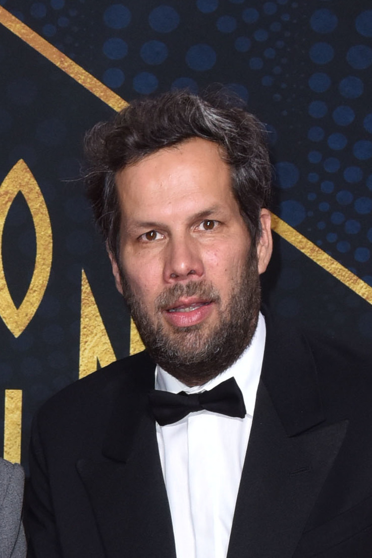 Tom Tykwer, Hendrik Handloegten und Achim von Borries auf der Premiere von "Babylon Berlin" im Berliner Ensemble Agency People Image (c.) Daniel Hinz